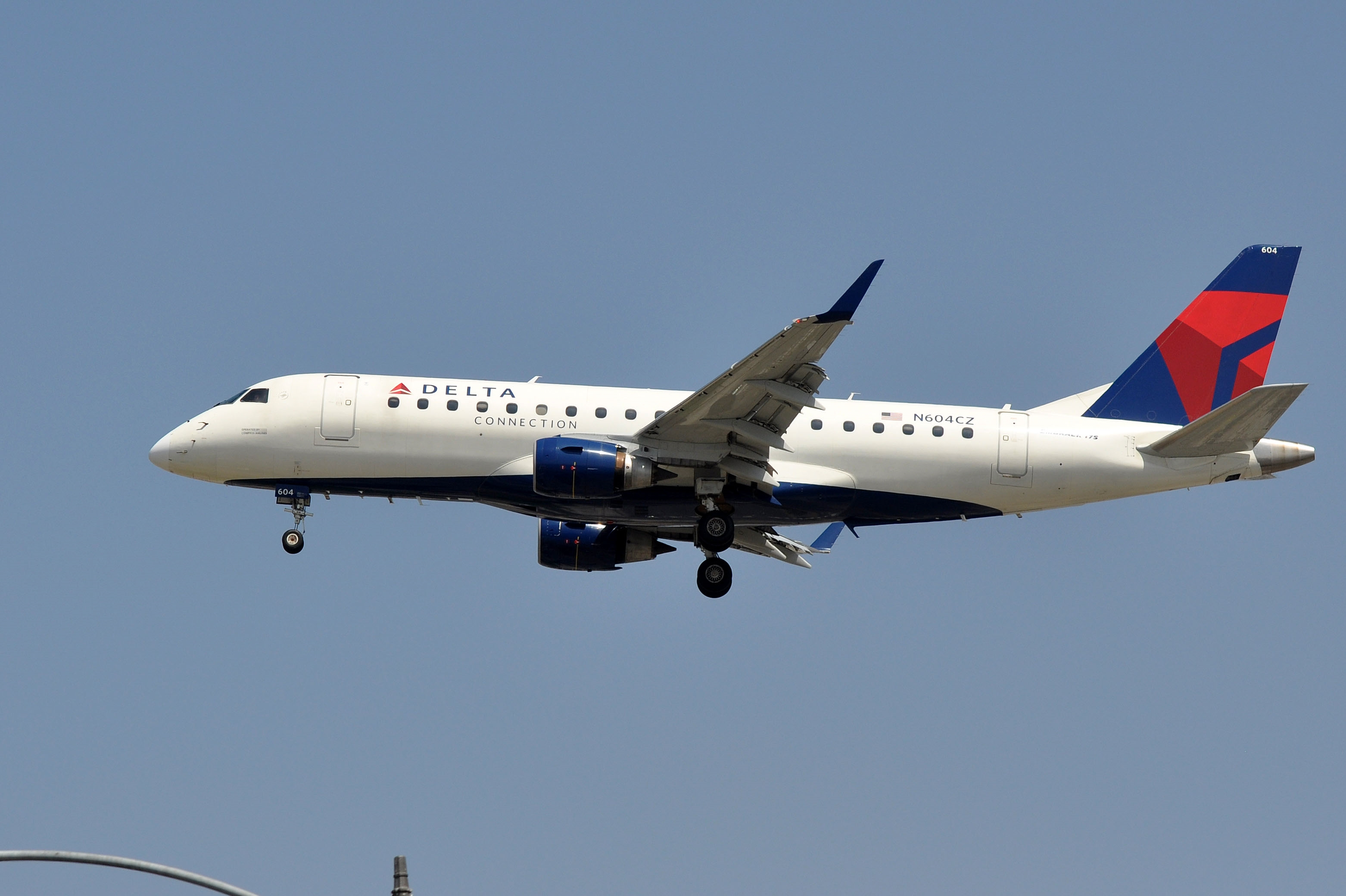 MSN 181 ERJ 175LR / 175 COMPASS AIRLINES / DELTA CONNECTION LAX AIRPORT